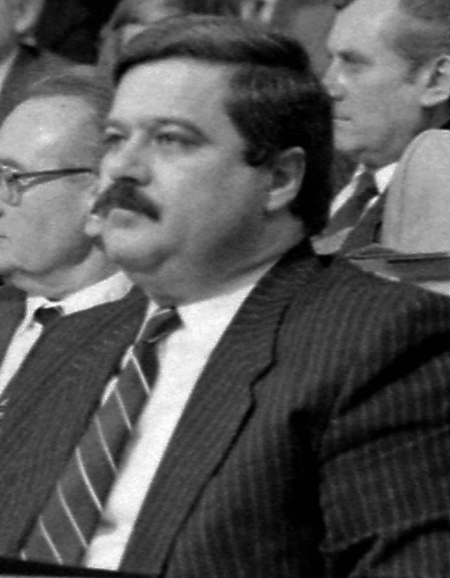 Nagy Sándor szakszervezeti vezető, ogy. képviselő (MSZMP, MSZP)